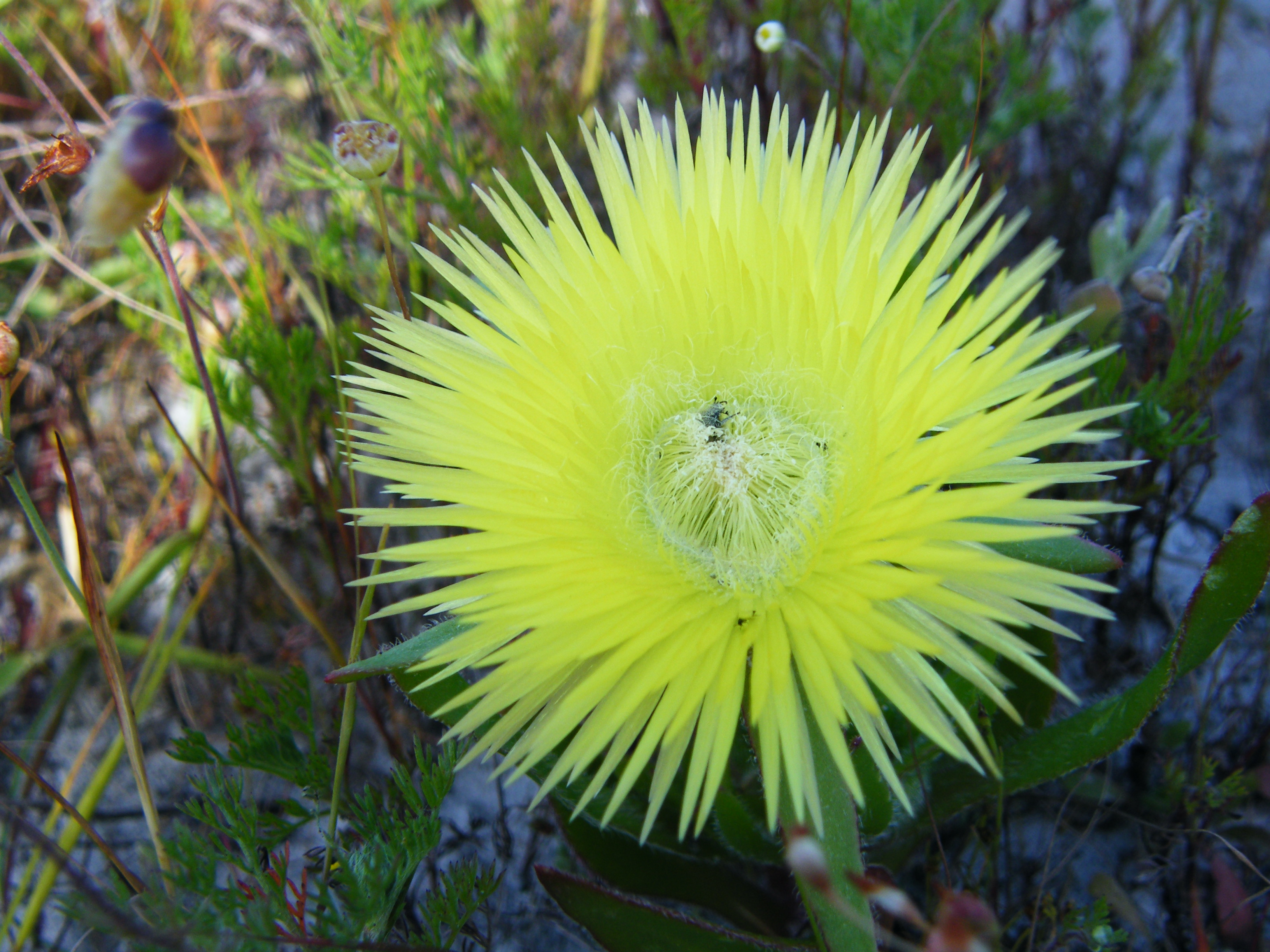 Vetkousie